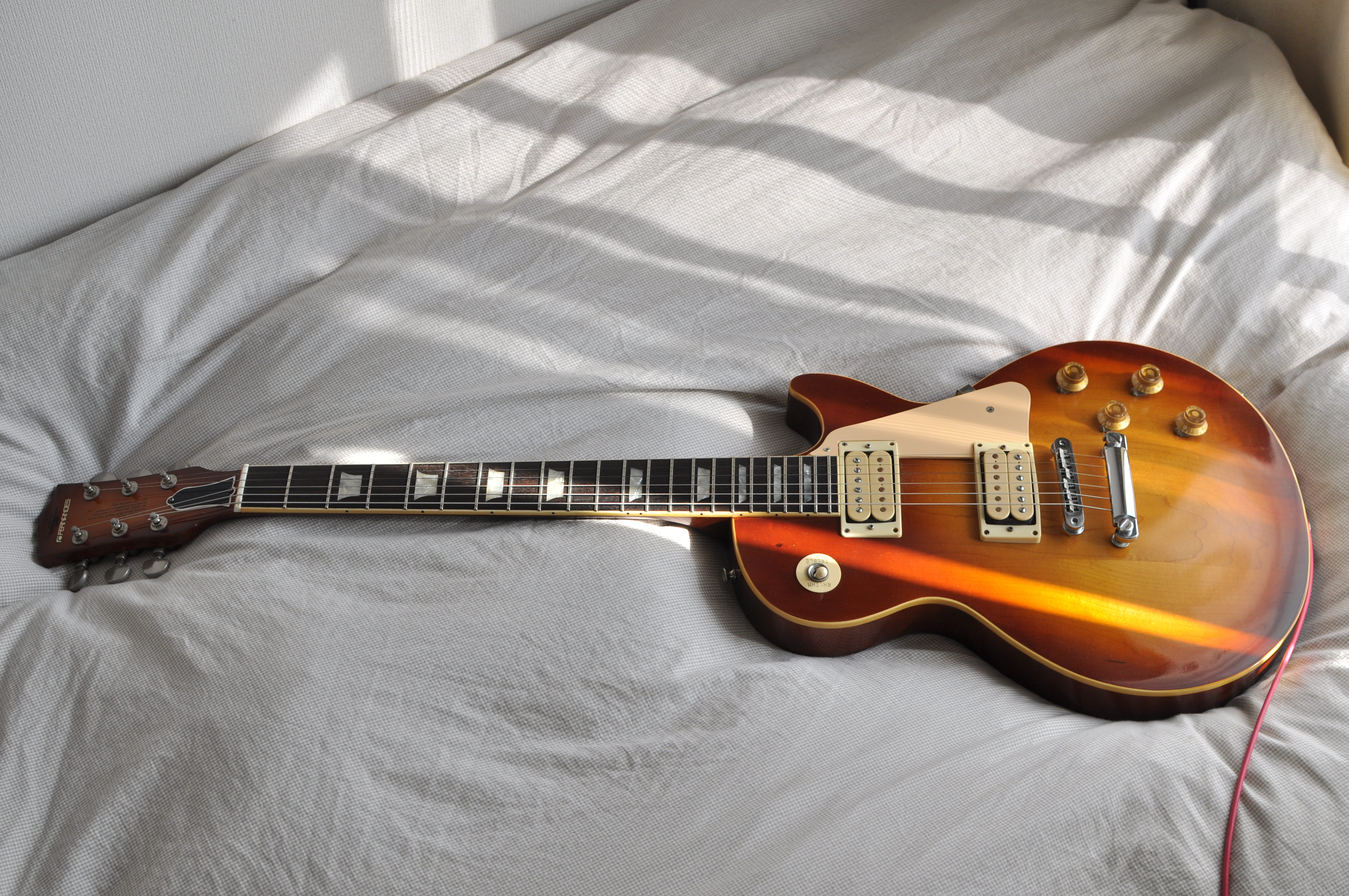 1978 Fernandes FLG-70 VX